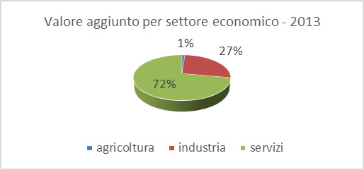 Suddivisione del PIL regionale della Lombardia in settore primario (Agricoltura), settore secondario (Industria) e settore terziario (Servizi).